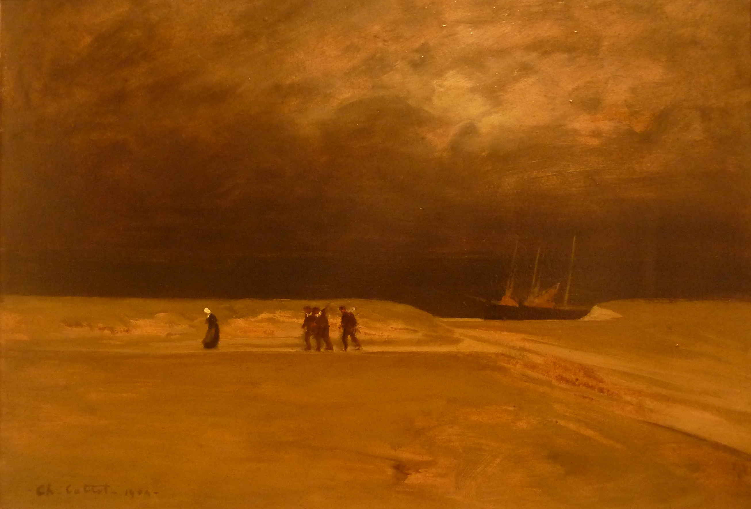 Charles Cottet : Avant l'orage (1904, huile sur carton, Conseil général du Morbihan)